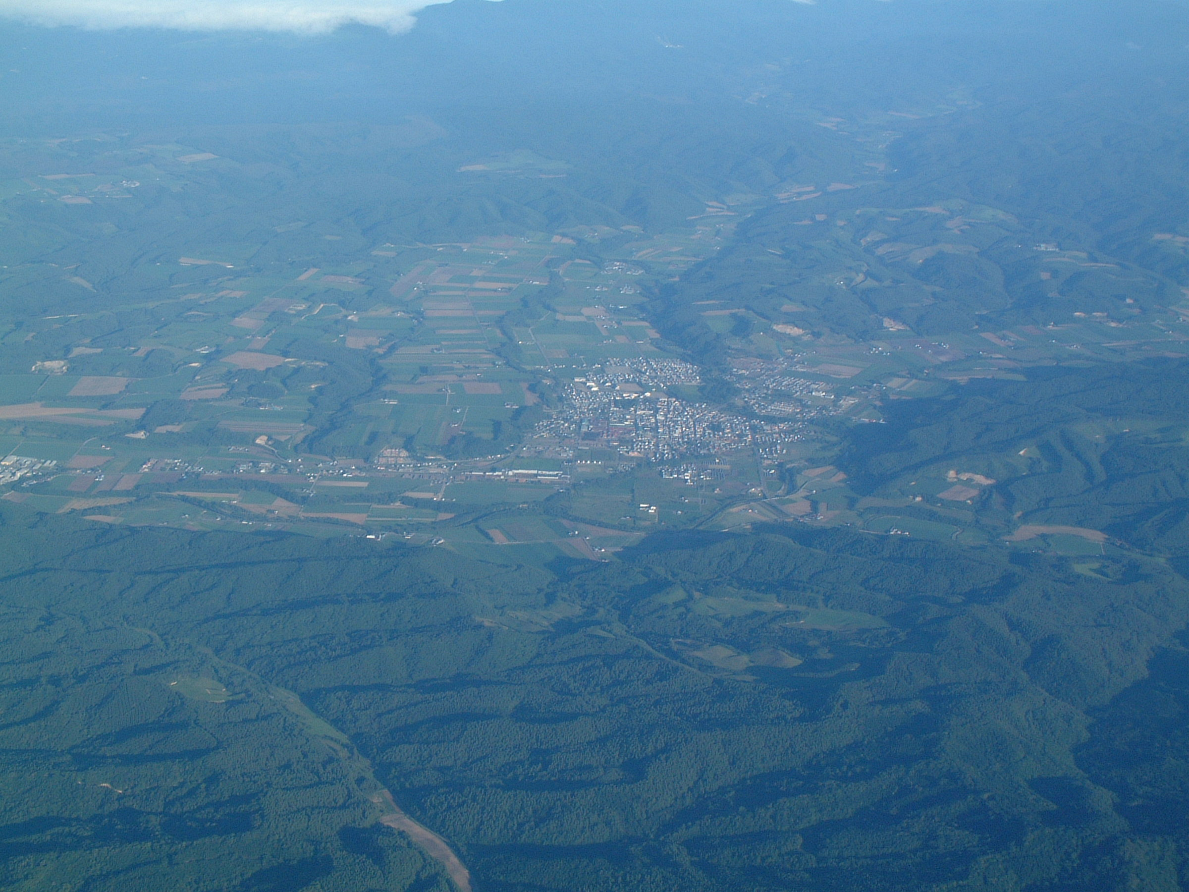 女満別空港着の旅客機から見た津別町市街地